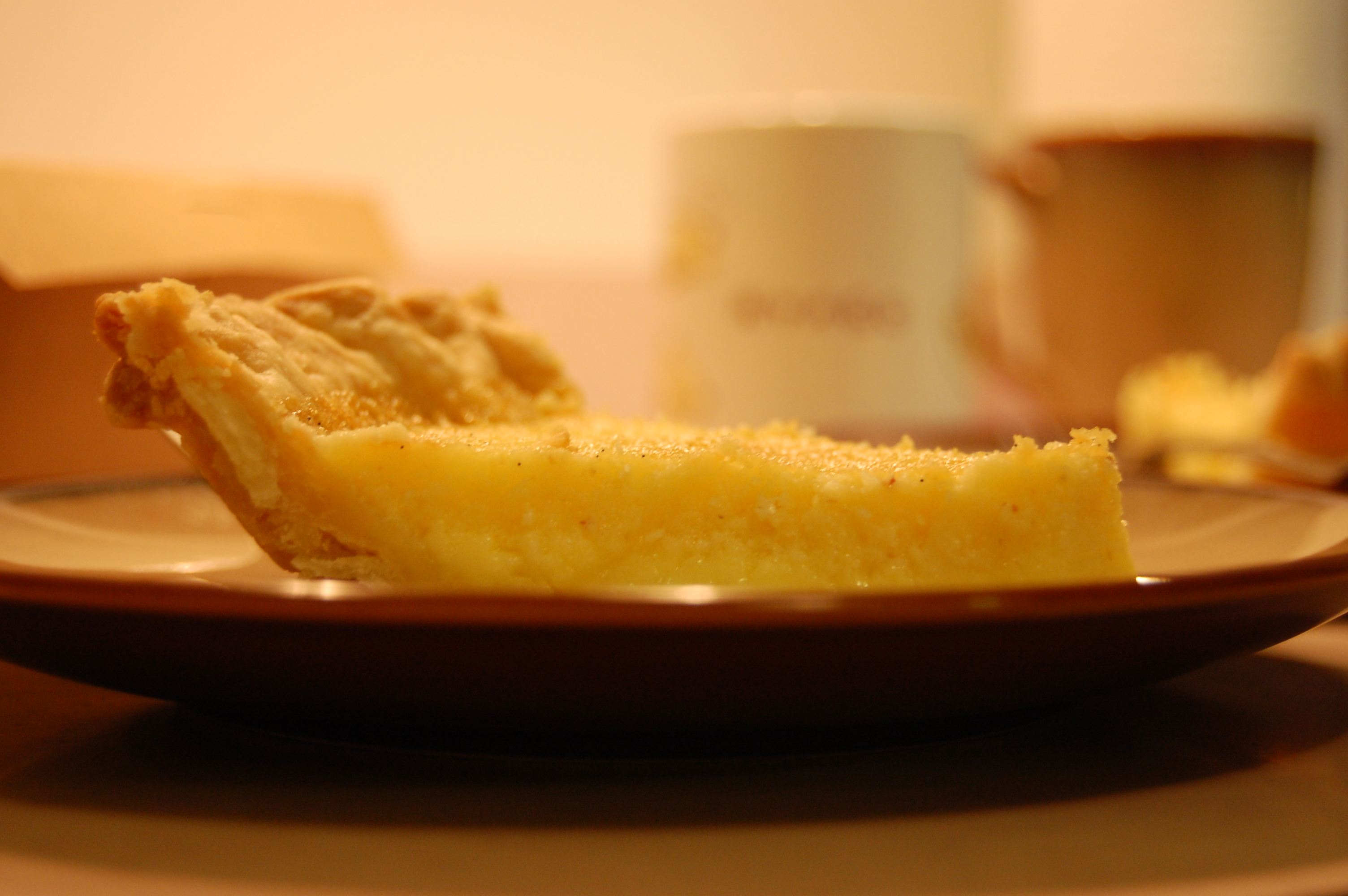 Vanilla buttermilk chess pie